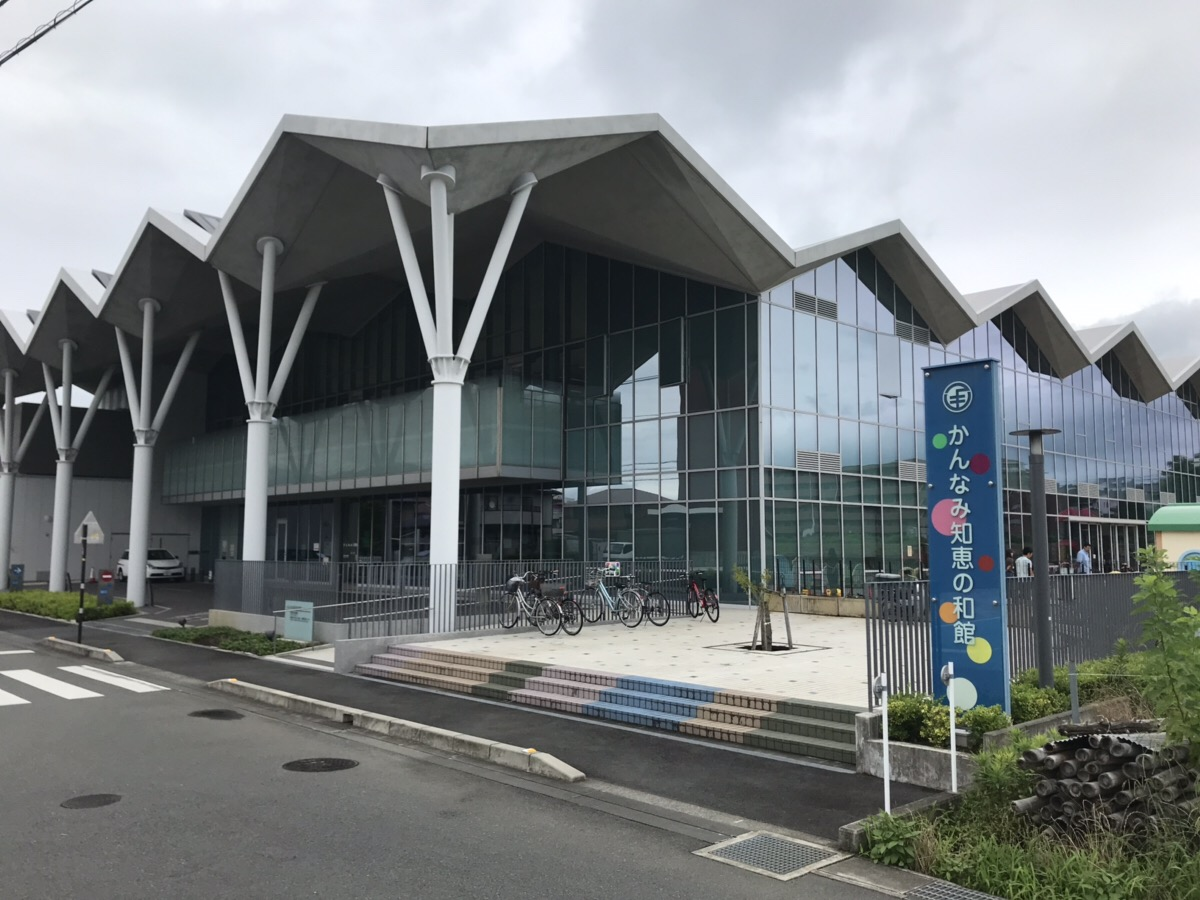 かんなみ知恵の和館正面